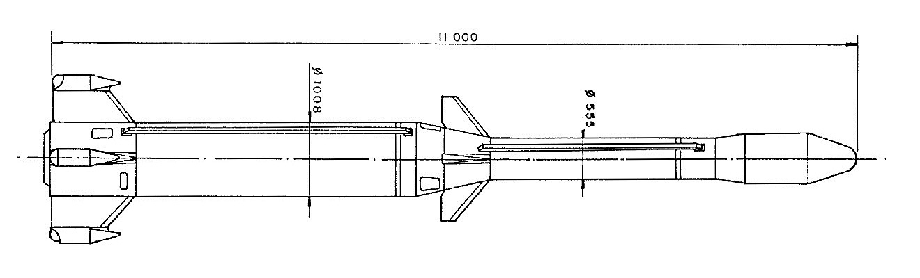 Esquema com as dimensões do foguete Sonda IV